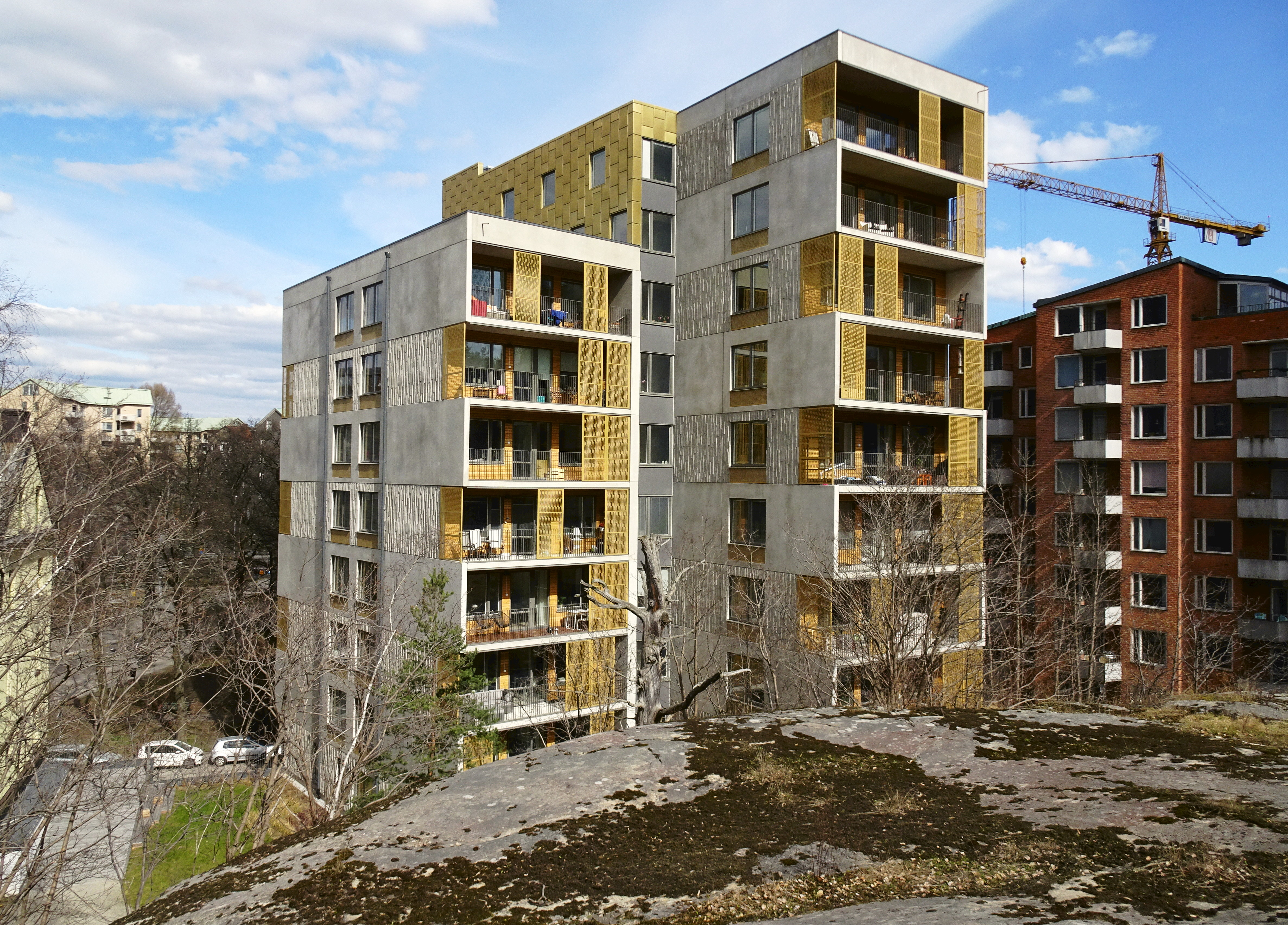 Bostadshuset "Riggen" i Gröndal, Arkitekterna Krook & Tjäder